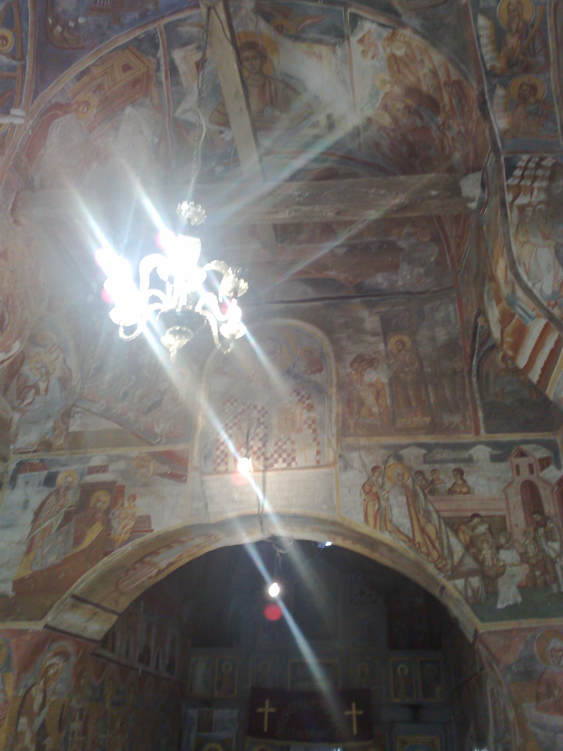 Фрескоживописот во манастирот Свети Никола Шишевски